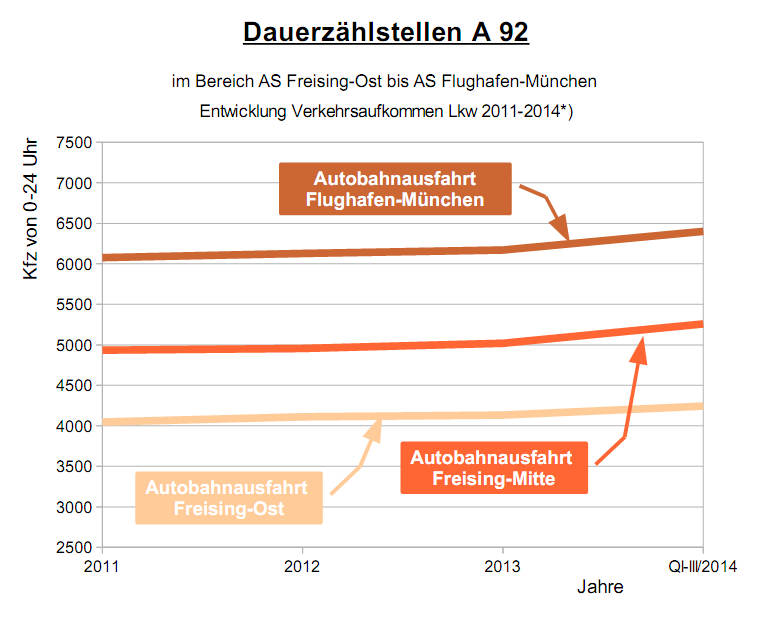 Verkehrsaufkommen Lkw 2004 bis 2014*) auf der A 92 erfasst durch die Dauerzählstellen Nr. 9182 AS Flughafen München, Nr. 9183 AS Freising-Mitte, Nr. 9184 AS Freising-Ost